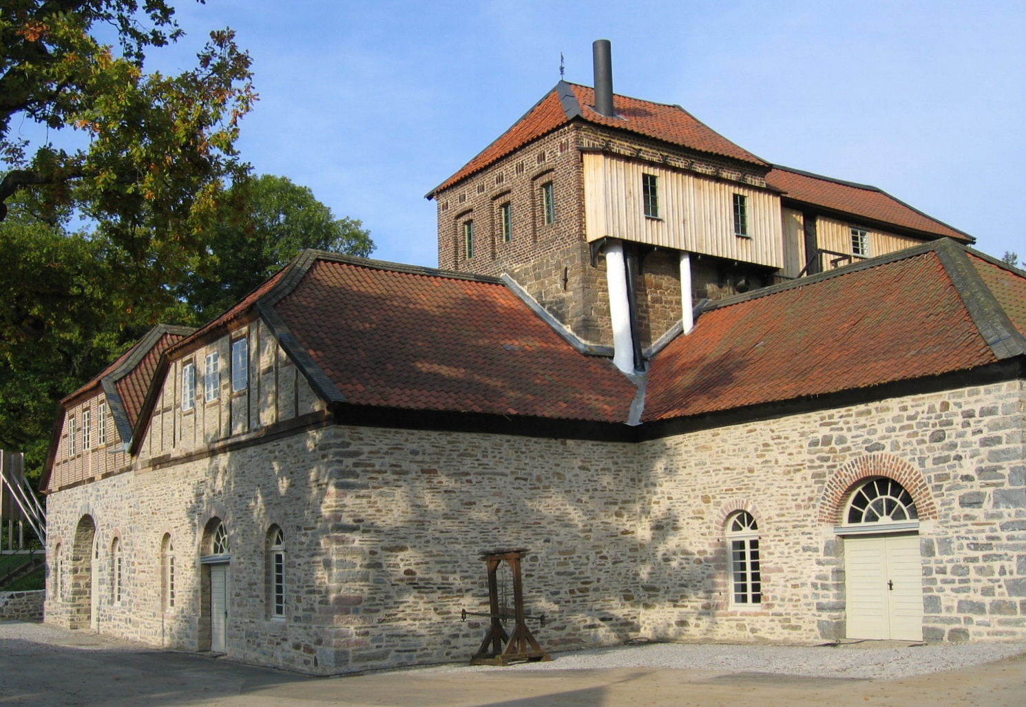 Description: Luisenhütte Wocklum in Balve (Germany) Source: selbst fotografiert Date: 9. Okt. 2005 Author: Bubo